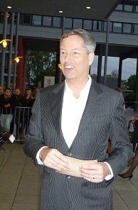 Thomas Hermanns während der Comedy-Gala 2011